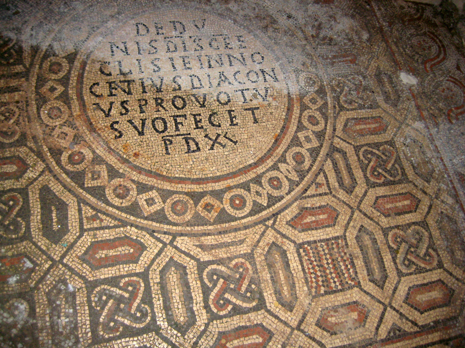 Euphrasian Basilica, Poreč, Croatia